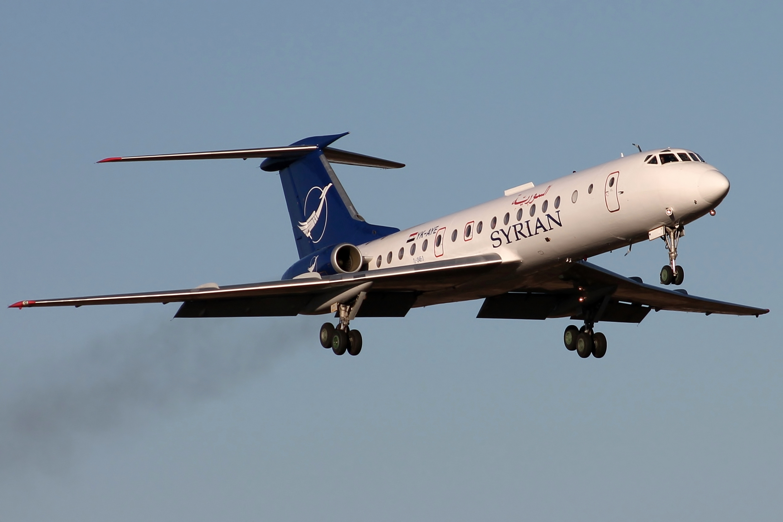 Ту-134Б Сирийских Авиалиний : посадка в аэропорту Внуково, 10.03.2014